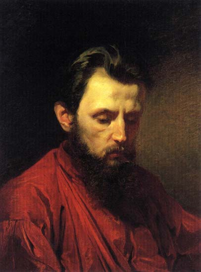 Литовченко А.Д. Портрет Шварца Вячеслава Григорьевича 1870. Portrait of Vyacheslav Schwarz.